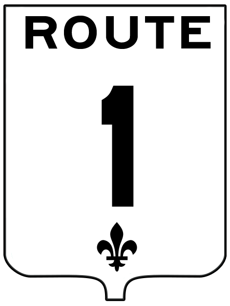 Signalisation de l'ancienne route québécoise 1